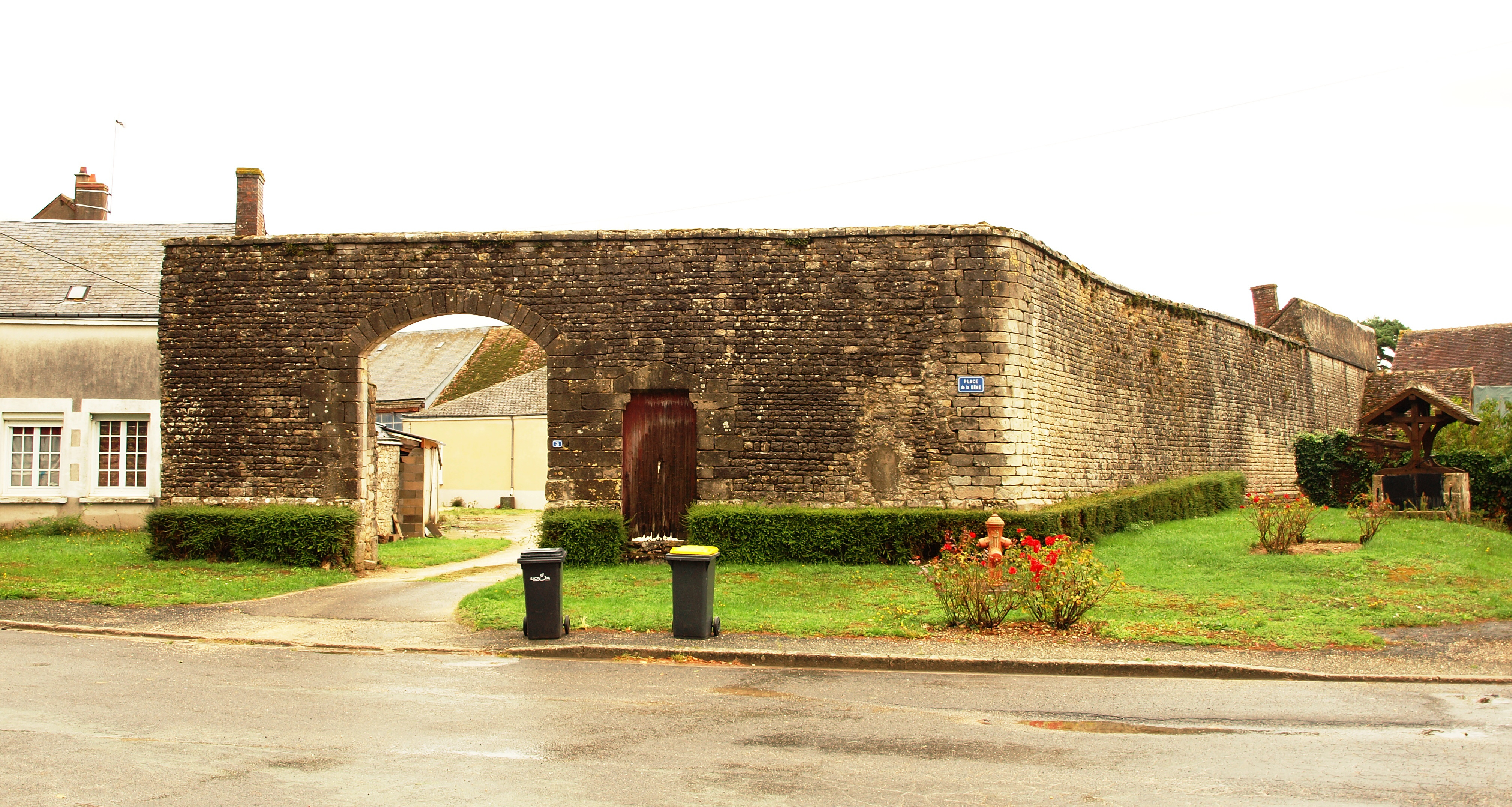 La Colombe (Loir-et-Cher) , hameau de la Gahandière